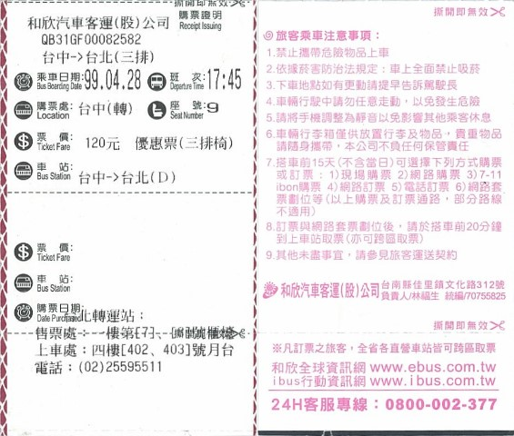 和欣客運2010年4月28日購票證明，實長99.0mm，實寬58.5mm；左為正面，右為背面。